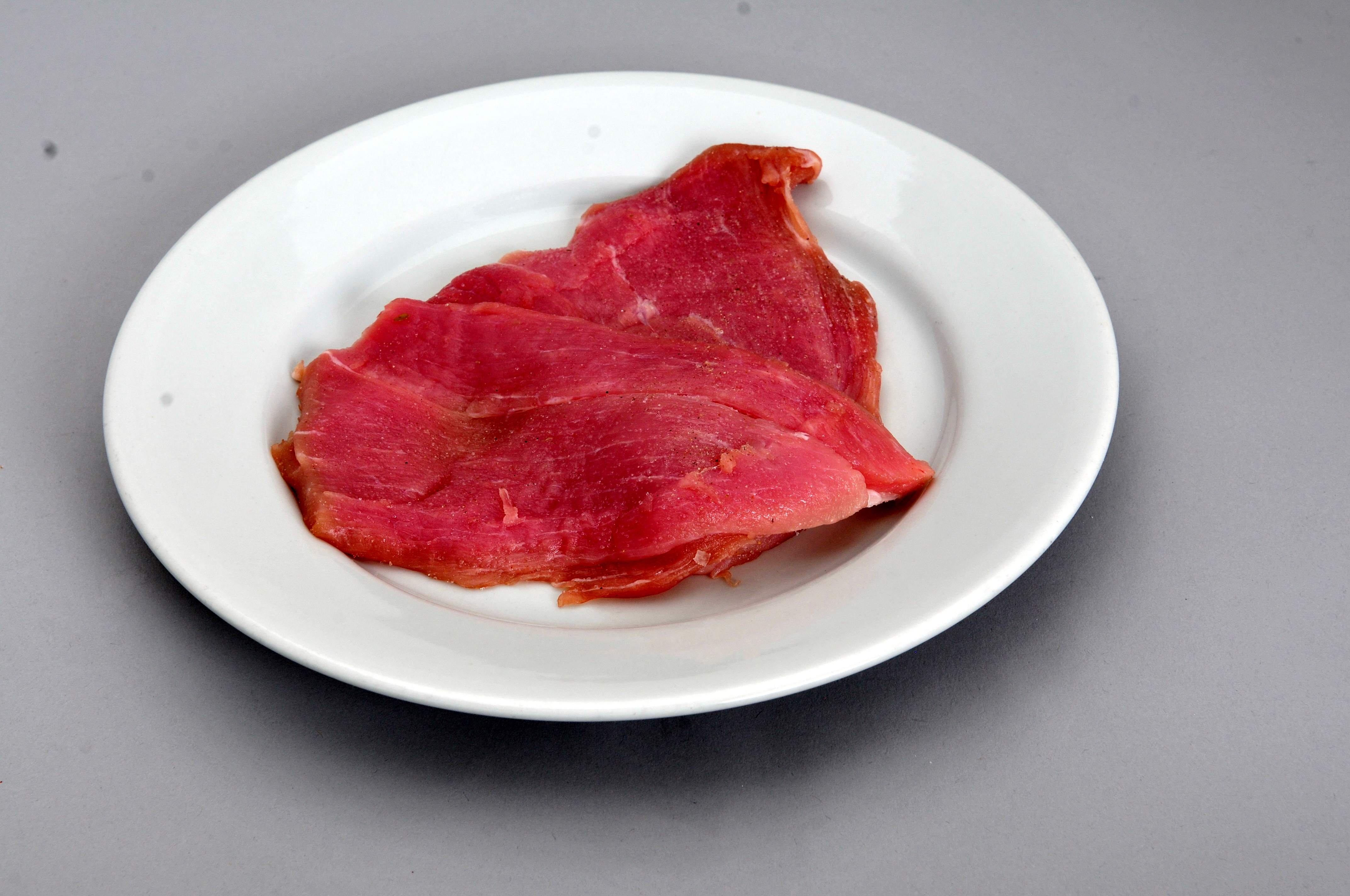 Treffen der Redaktion Essen und Trinken ion Wien